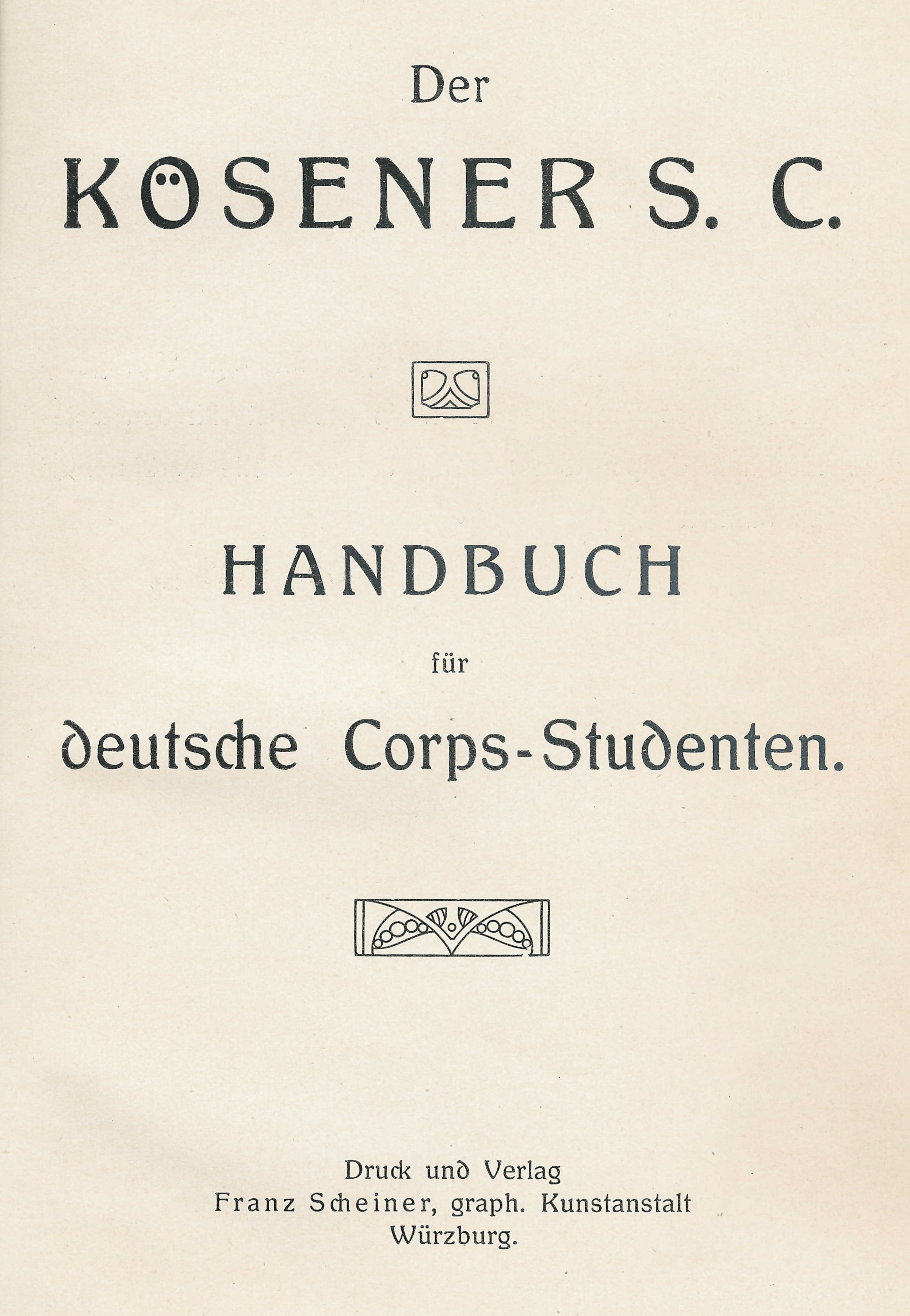 Titelblatt des Handbuchs für deutsche Corpsstudenten